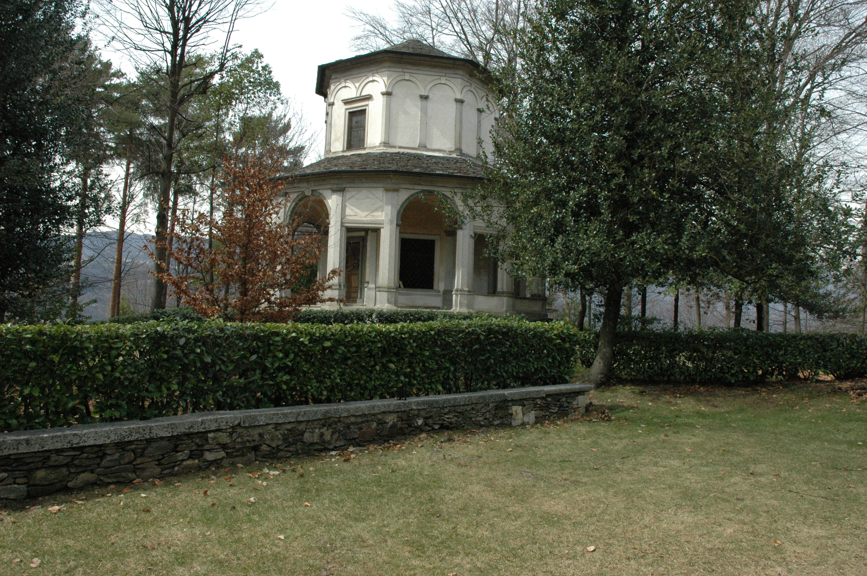 Sacro Monte di Orta. Cappella n.8. San Francesco sul carro di fuoco.